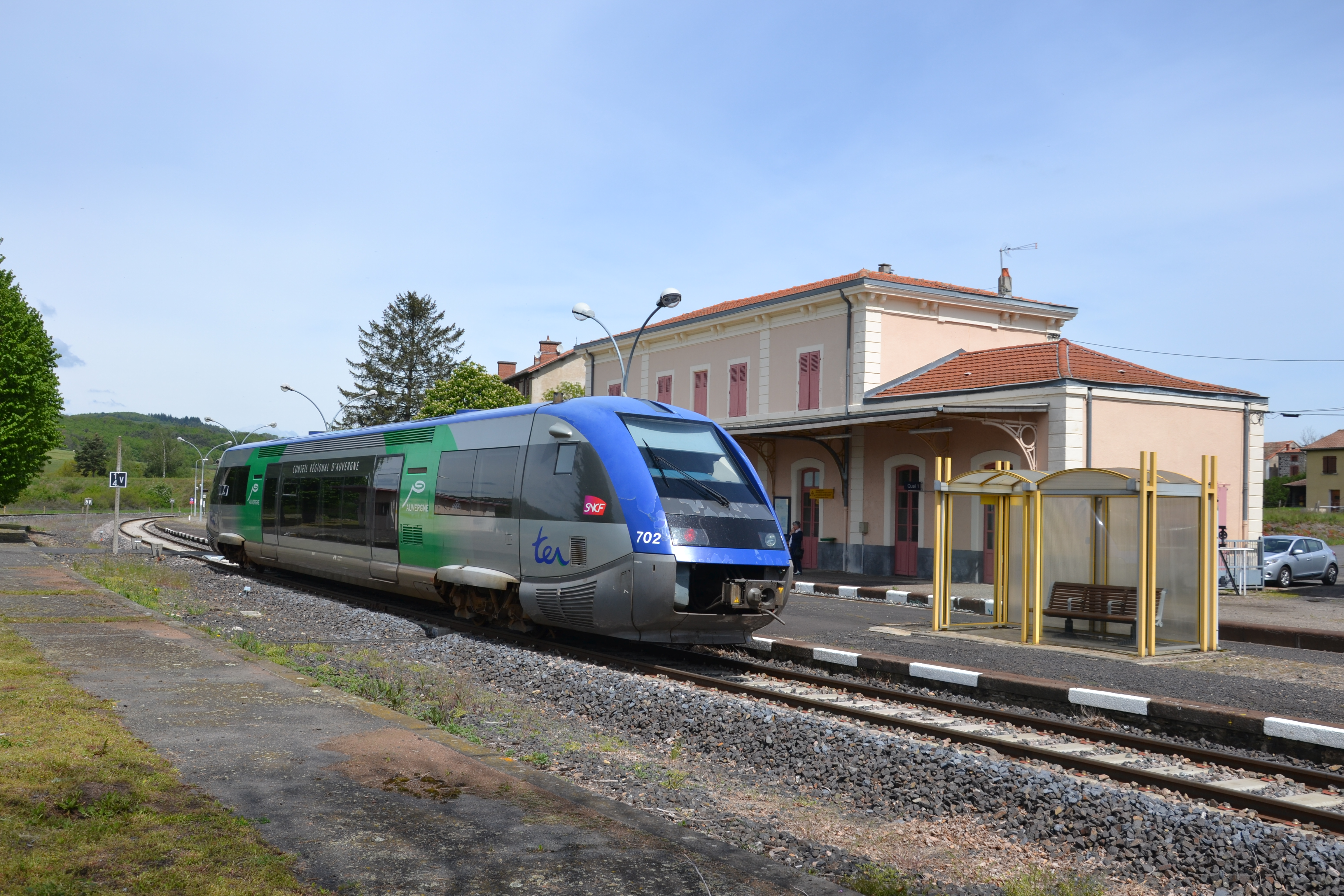 Gare St Georges d'Aurac arrêt du Nîmes Clermont de 11h55, autorail X73702 en livrée Auvergne.